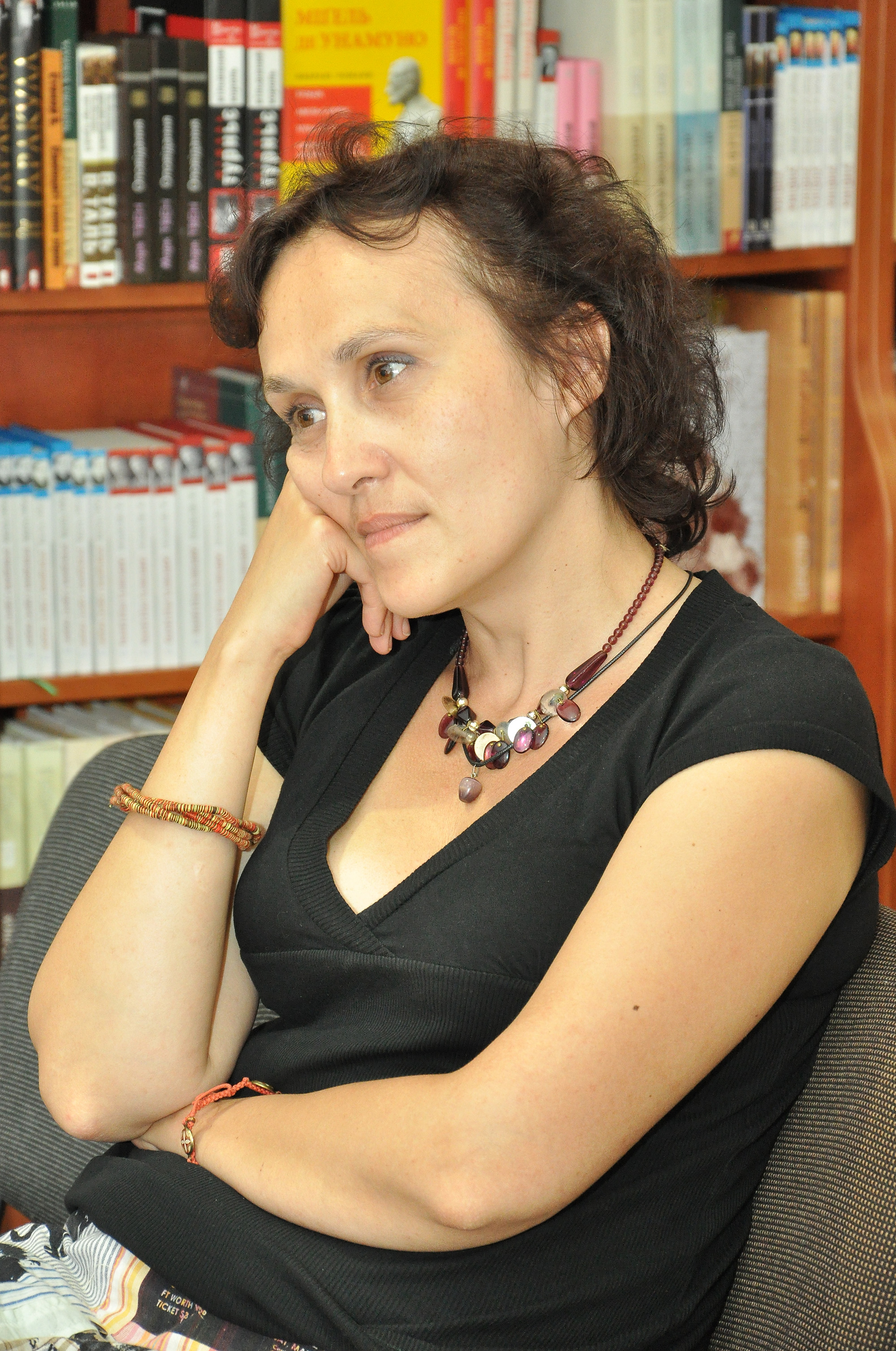 Українська письменниця, художниця, ілюстраторка книг Ганна Осадко на презентації книжки Оксани Куценко «Лялечки» в книгарні «Є» в Тернополі 17 червня 2016 року.